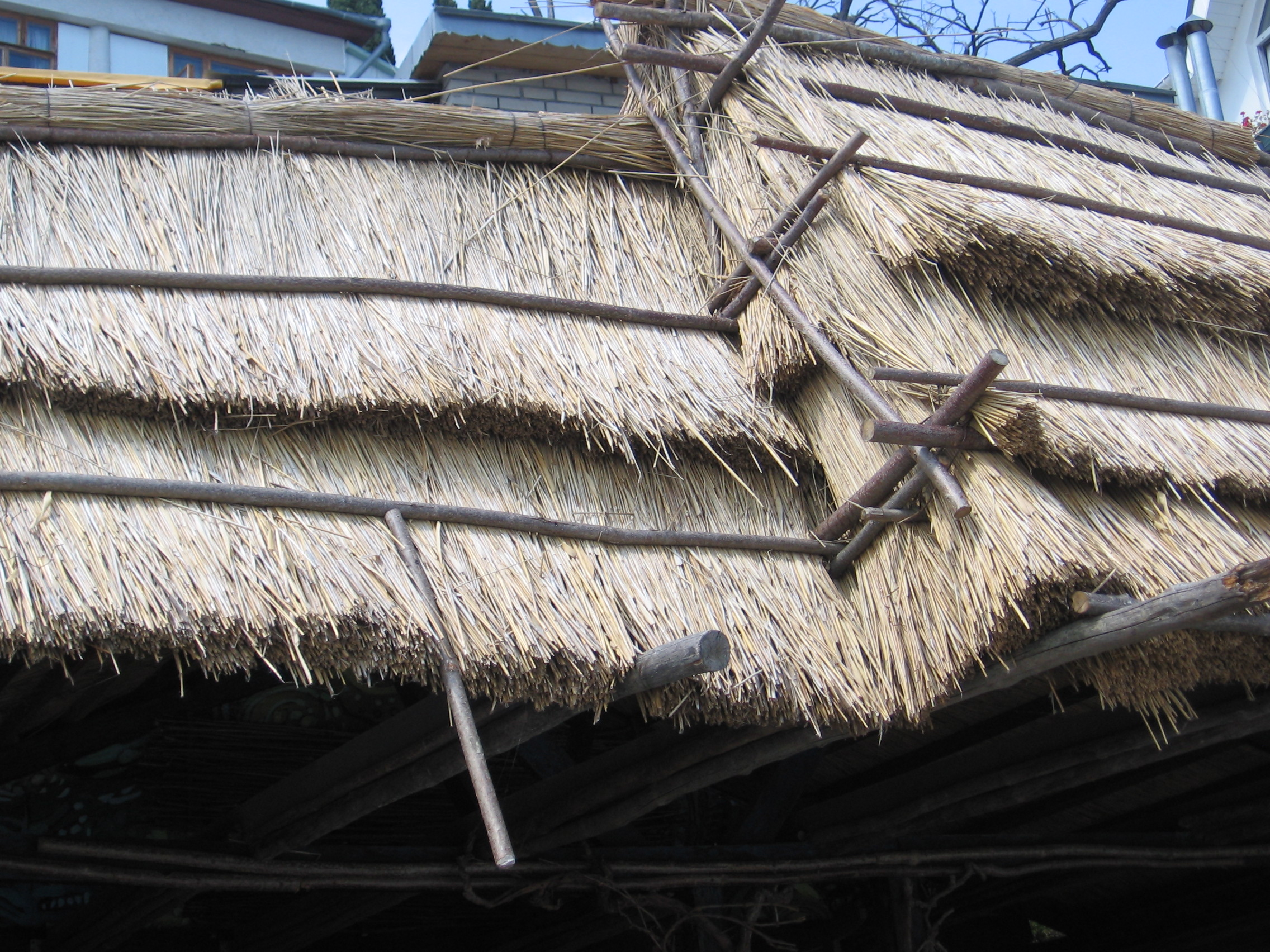 Фото